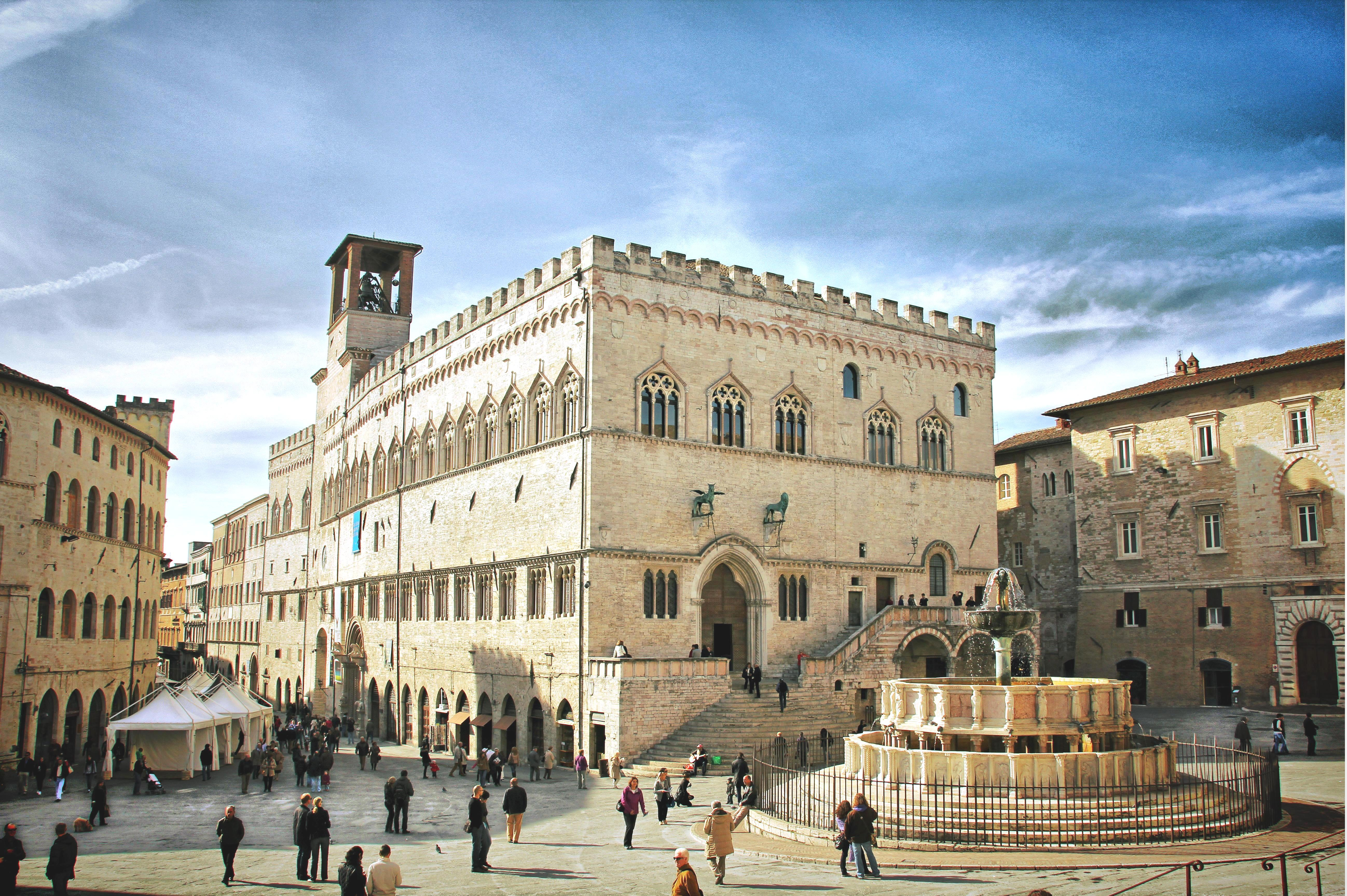 Perugia - Palazzo dei Priori This is a photo of a monument which is part of cultural heritage of Italy.